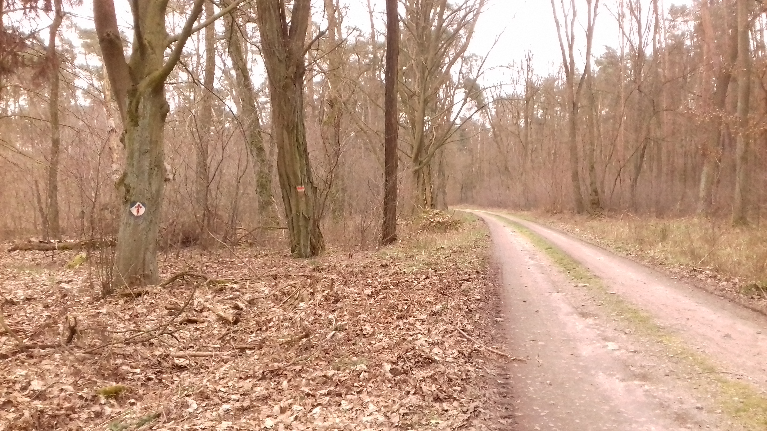 Oznaczenie szlaku pieszego nr 3578 (czerwonego) i Wielkopolskiej Drogi Świętego Jakuba w lesie w pobliżu Żabna